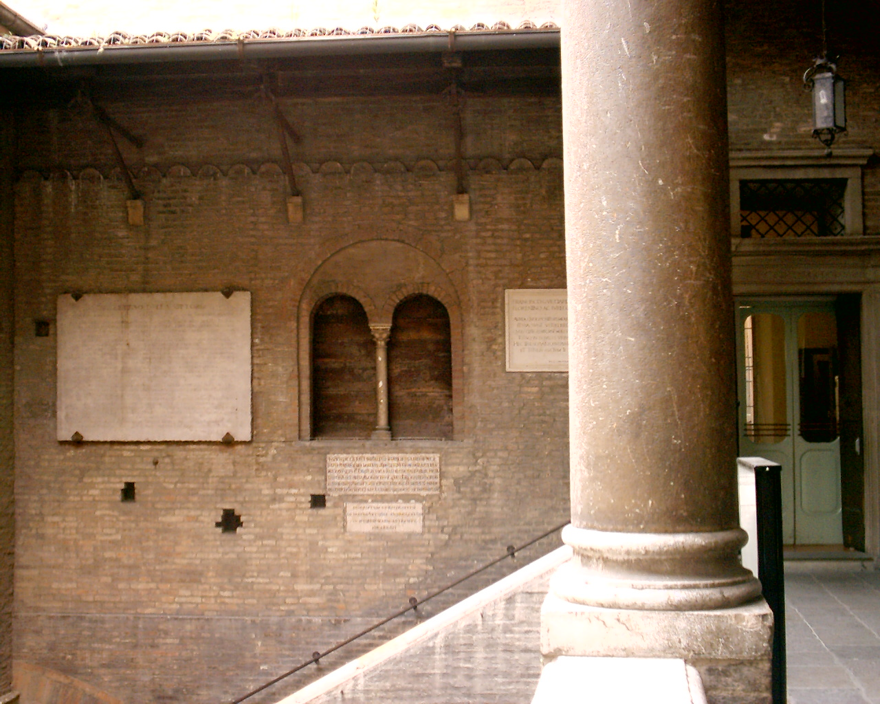 Resti medievali del precedente Palazzo Comunale di Modena.